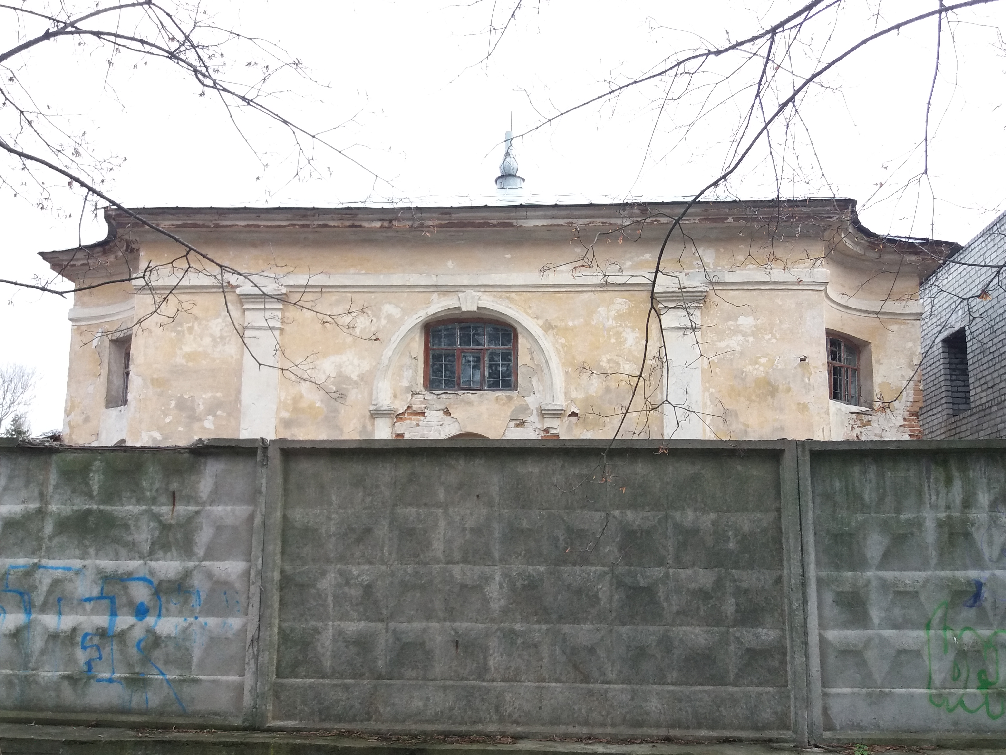 Будинок для спостереження за рухом по Дніпру, Кременчук, вул. Гоголя, 2